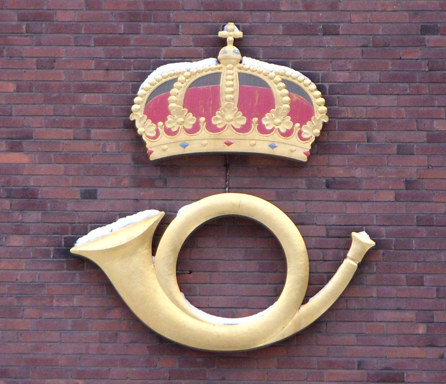 Svenska Postens logo på Posthuset Gullmarsplan, Stockholm